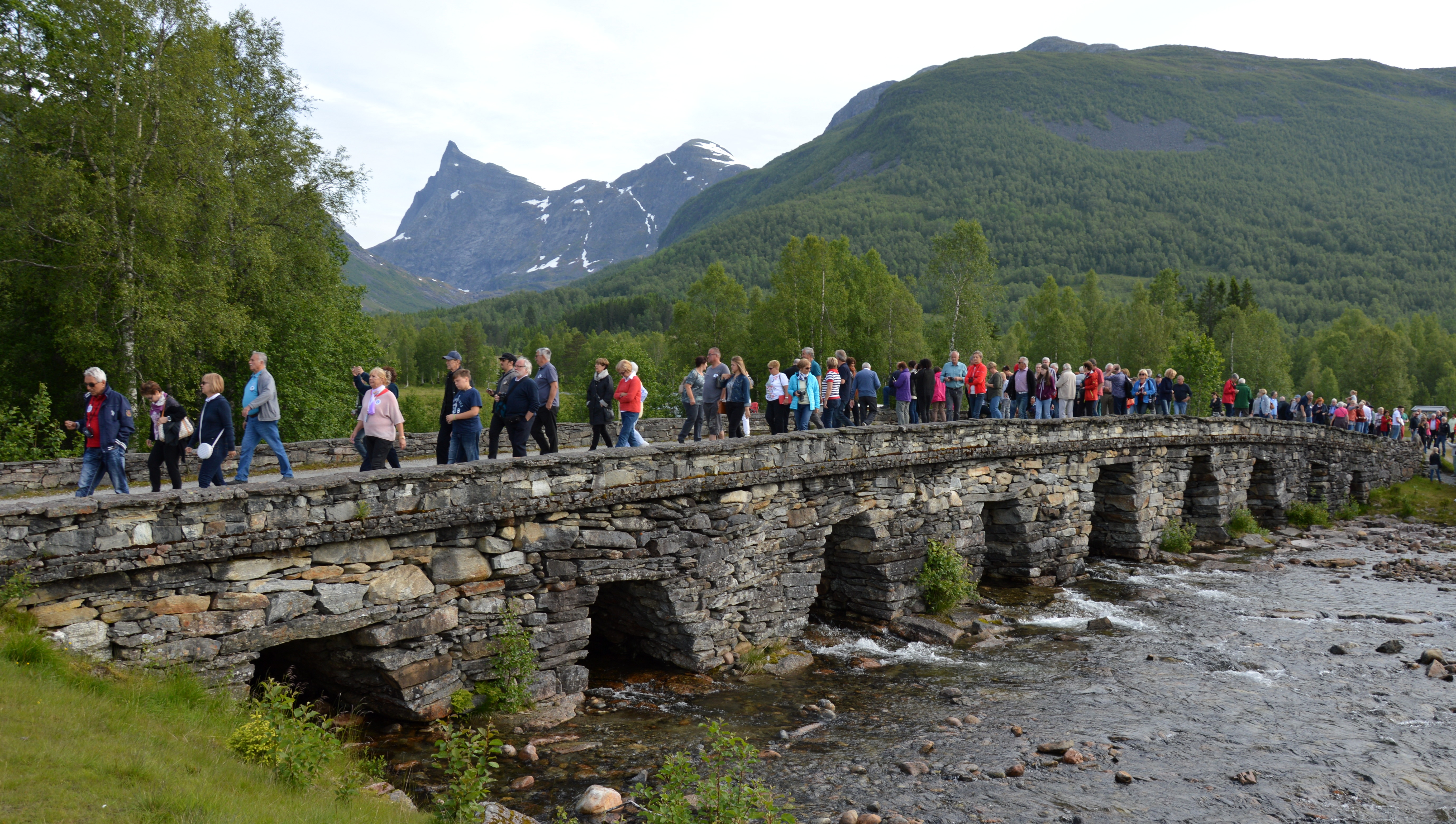 Touristen auf der Hornindal-Brücke